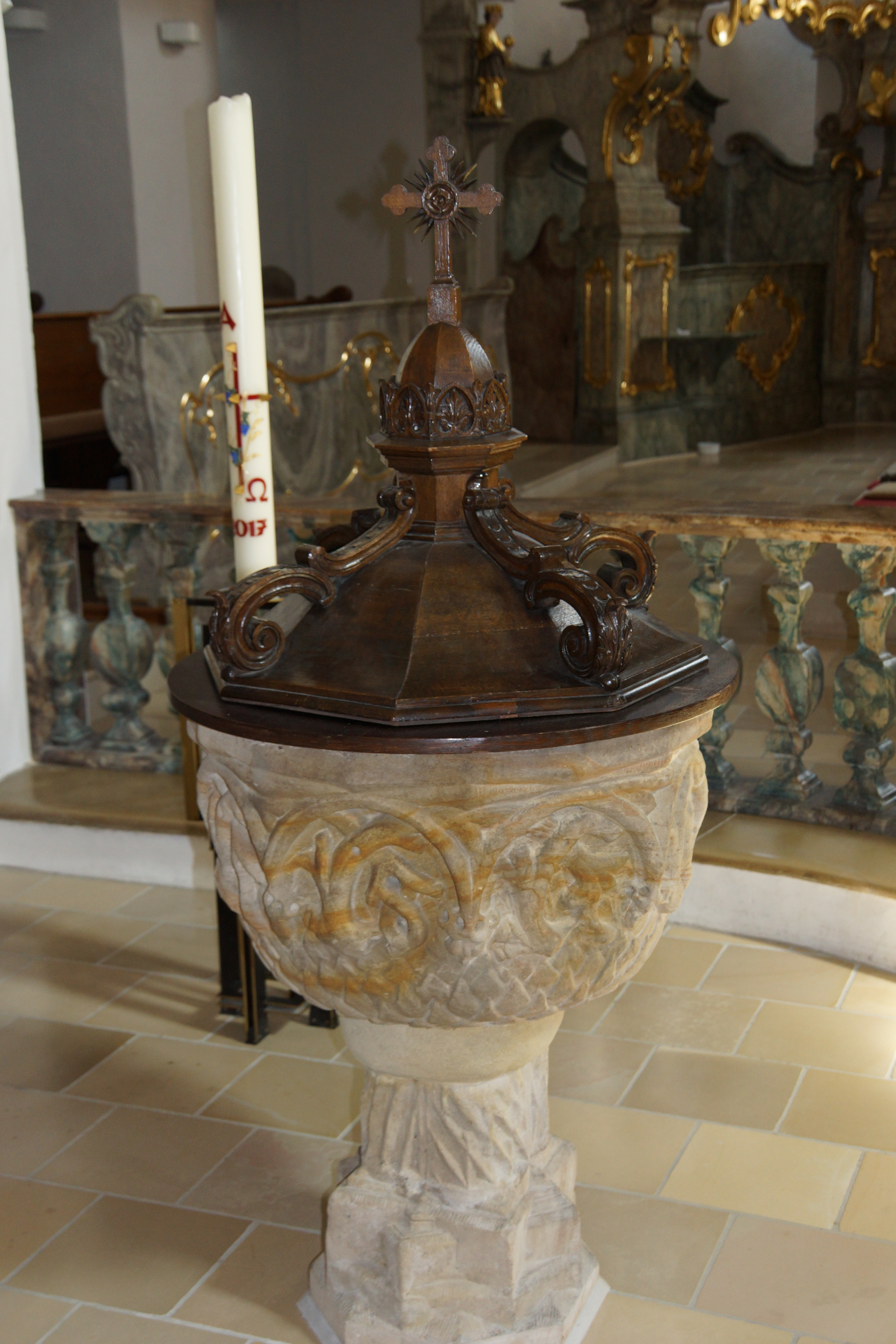 Die Pfarrkirche St. Johannes in Auerbach in der Oberpfalz